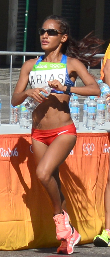 Passage du marathon des jeux olympiques de Rio 2016 dans le centre de Rio